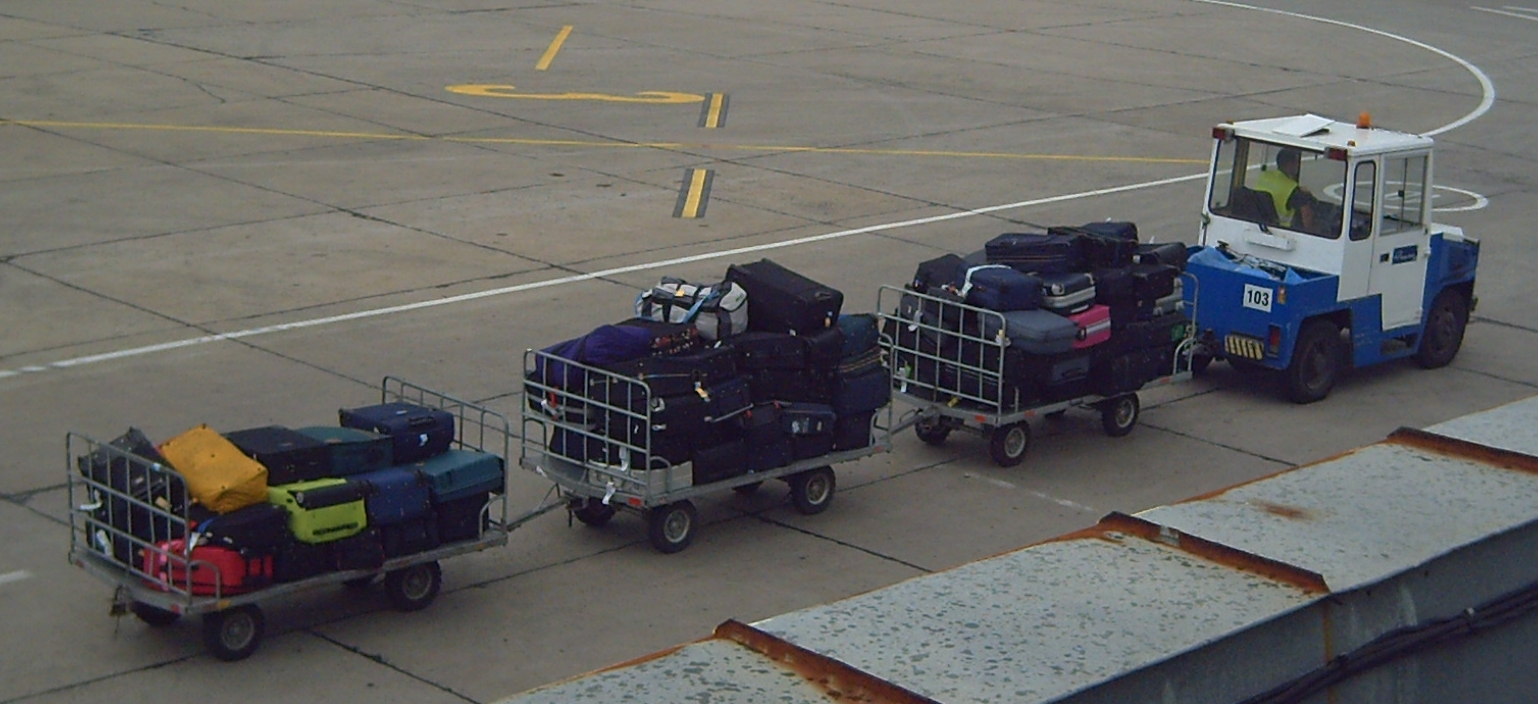 Elektrokarren zum Transport von Gepäck am Flughafen Burgas, Bulgarien